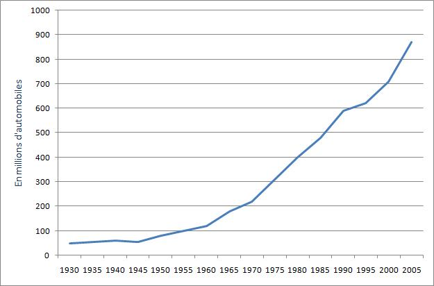 Graphique de l'évolution du parc automobile mondial depuis 1930